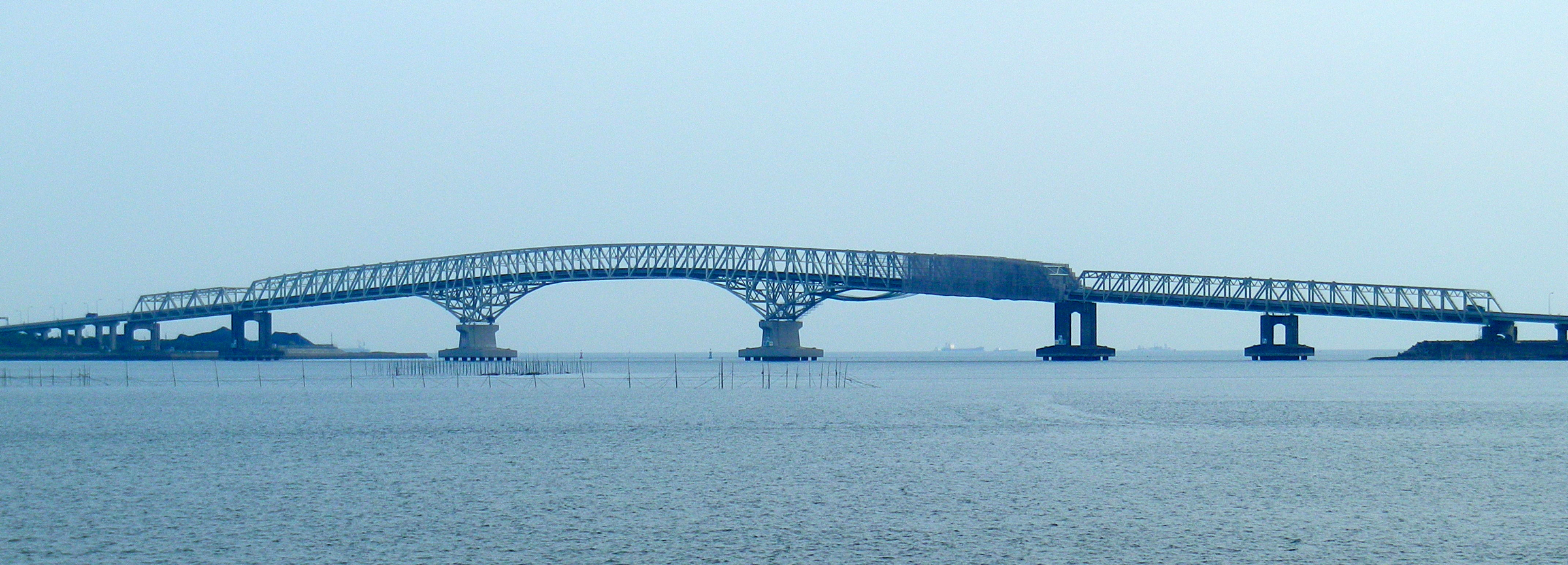 山口県宇部市。宇部興産専用道路の一部である興産大橋。2011年6月1日撮影。